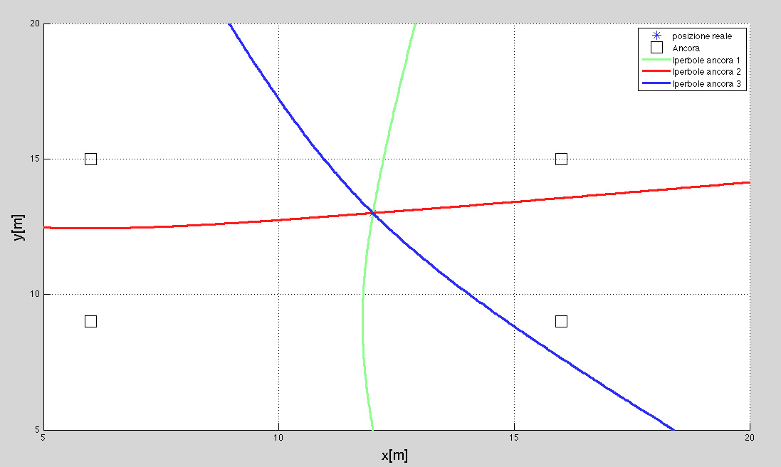 Intersezioni di tre iperboli che identificano la posizione di un dispositivo